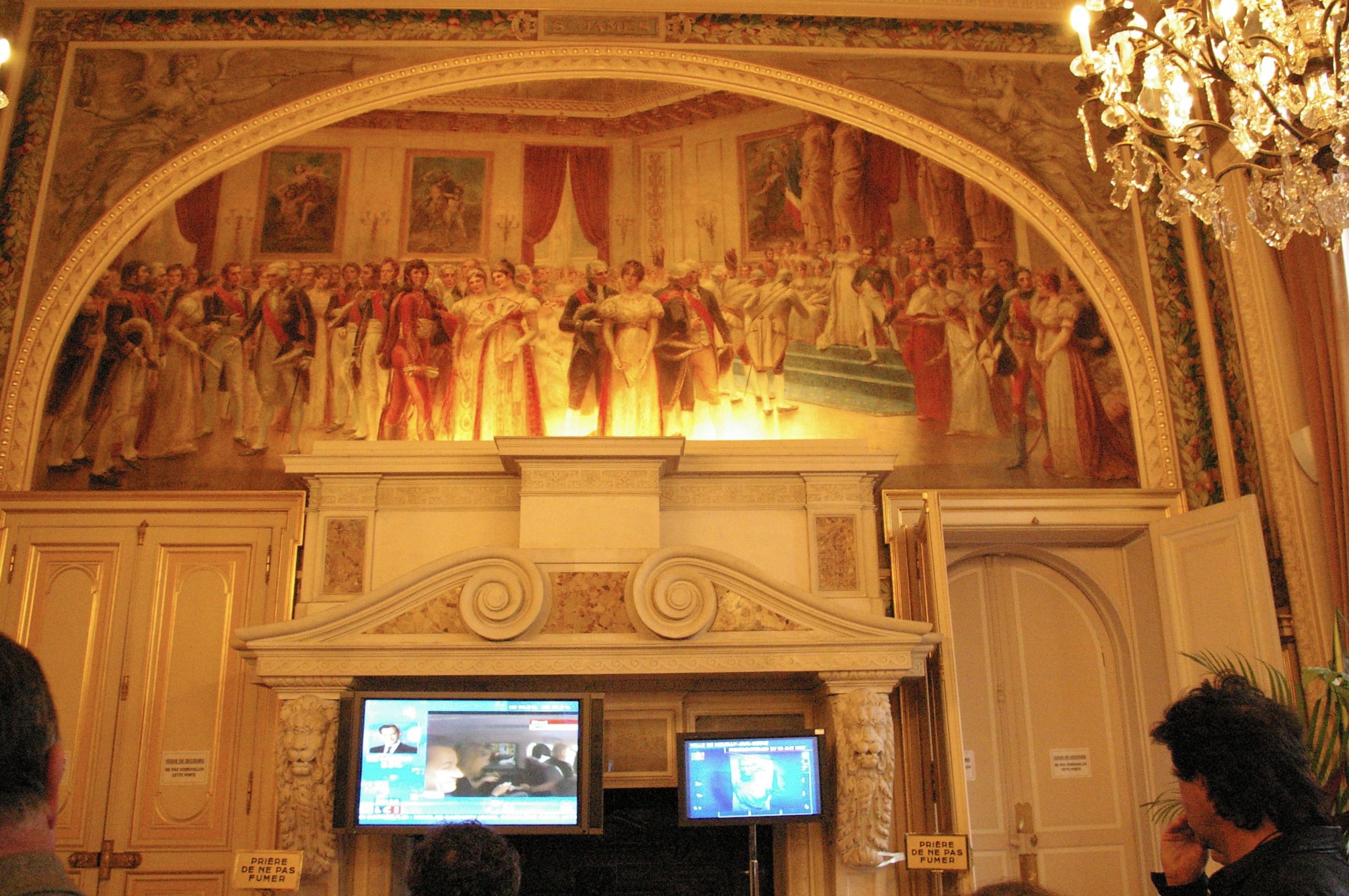 Mairie de Neuilly - réception au château de Neuilly - 6 mai 2007